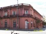 Imagen del Correo de Concepción del Uruguay.